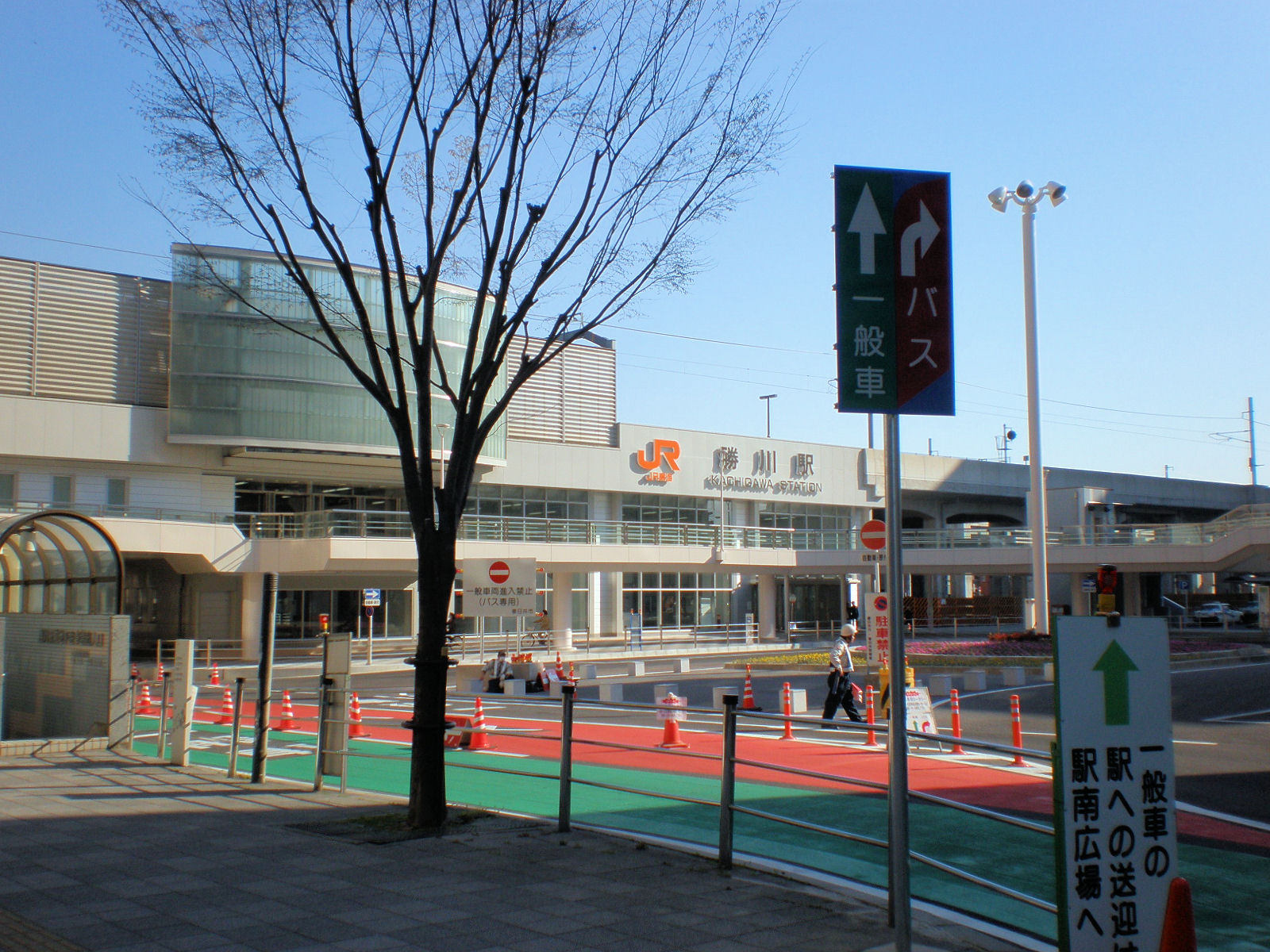 愛知県春日井市にあるJR東海勝川駅